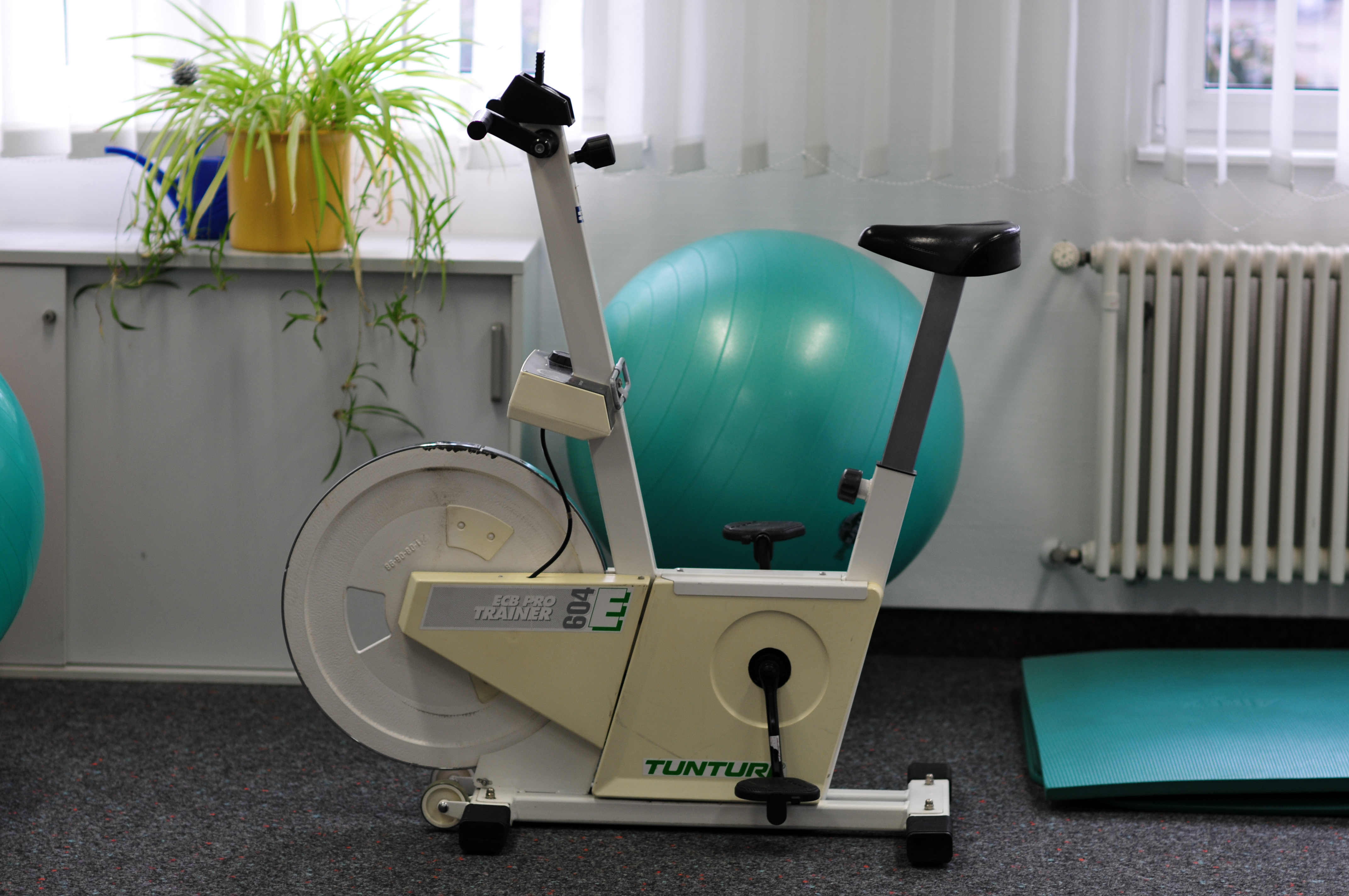 Tunturi, finnischer Hersteller von Fahrrädern und medizinischen Geräten